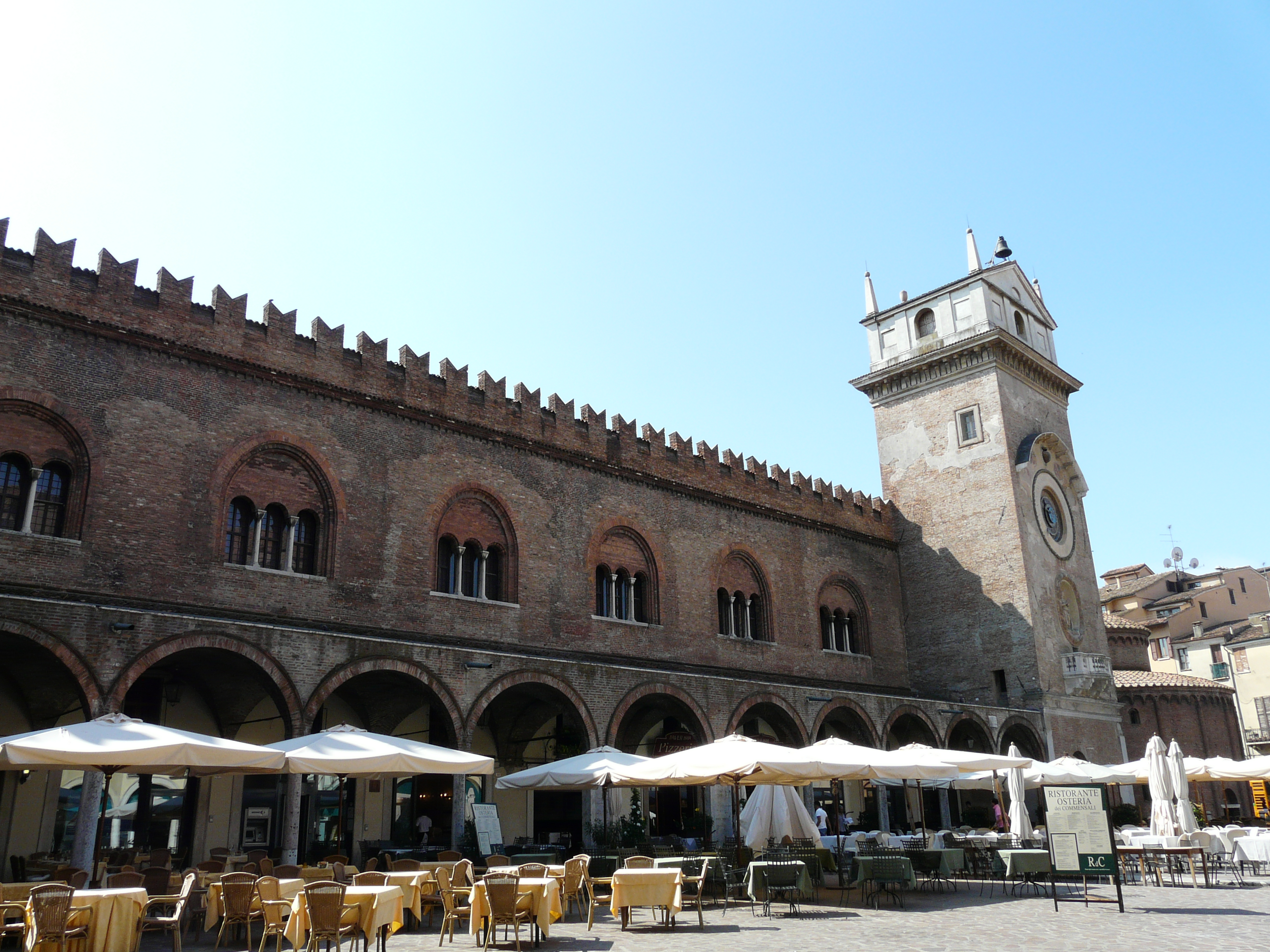 Piazza delle Erbe, Mantova, Lombardia, Italia